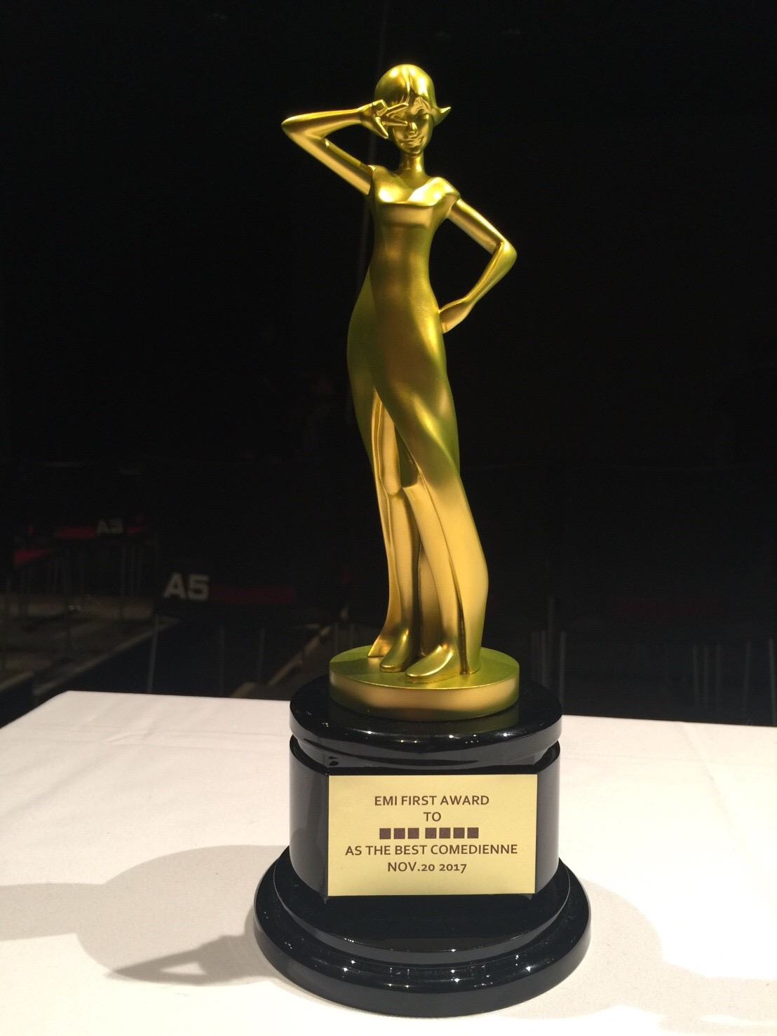 エミィ像受賞者に授与される金のエミィ像